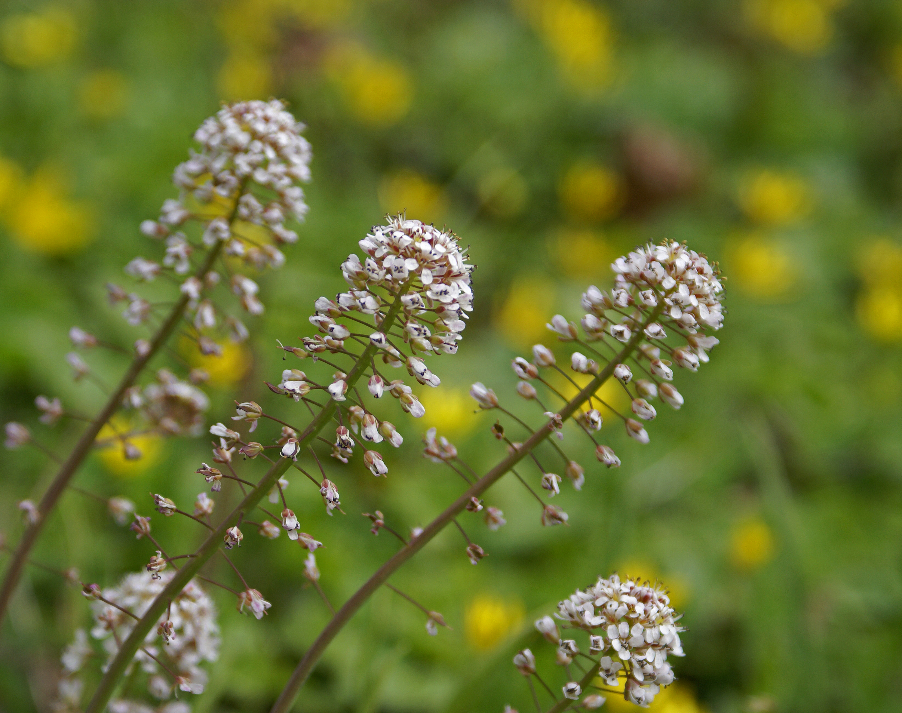 Vårpengeurt - Alpine penny-cress - Thlaspi caerulescens